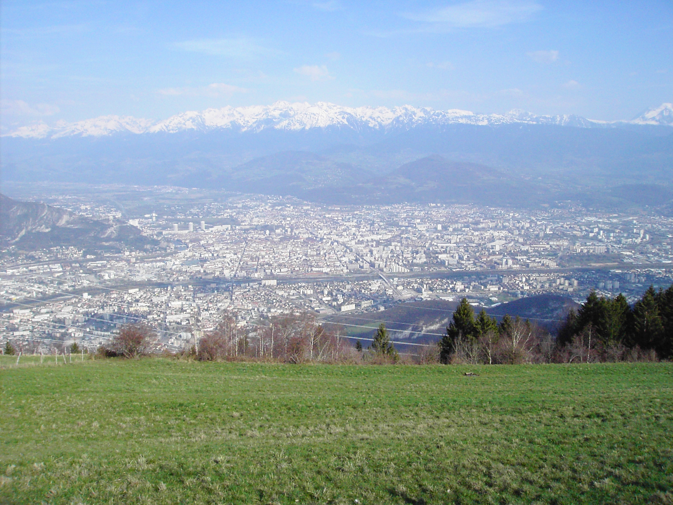 Grenoble depuis St Nizier : La tour centrale des "3 Tours" à gauche se trouve à 7086 m. du photographe.